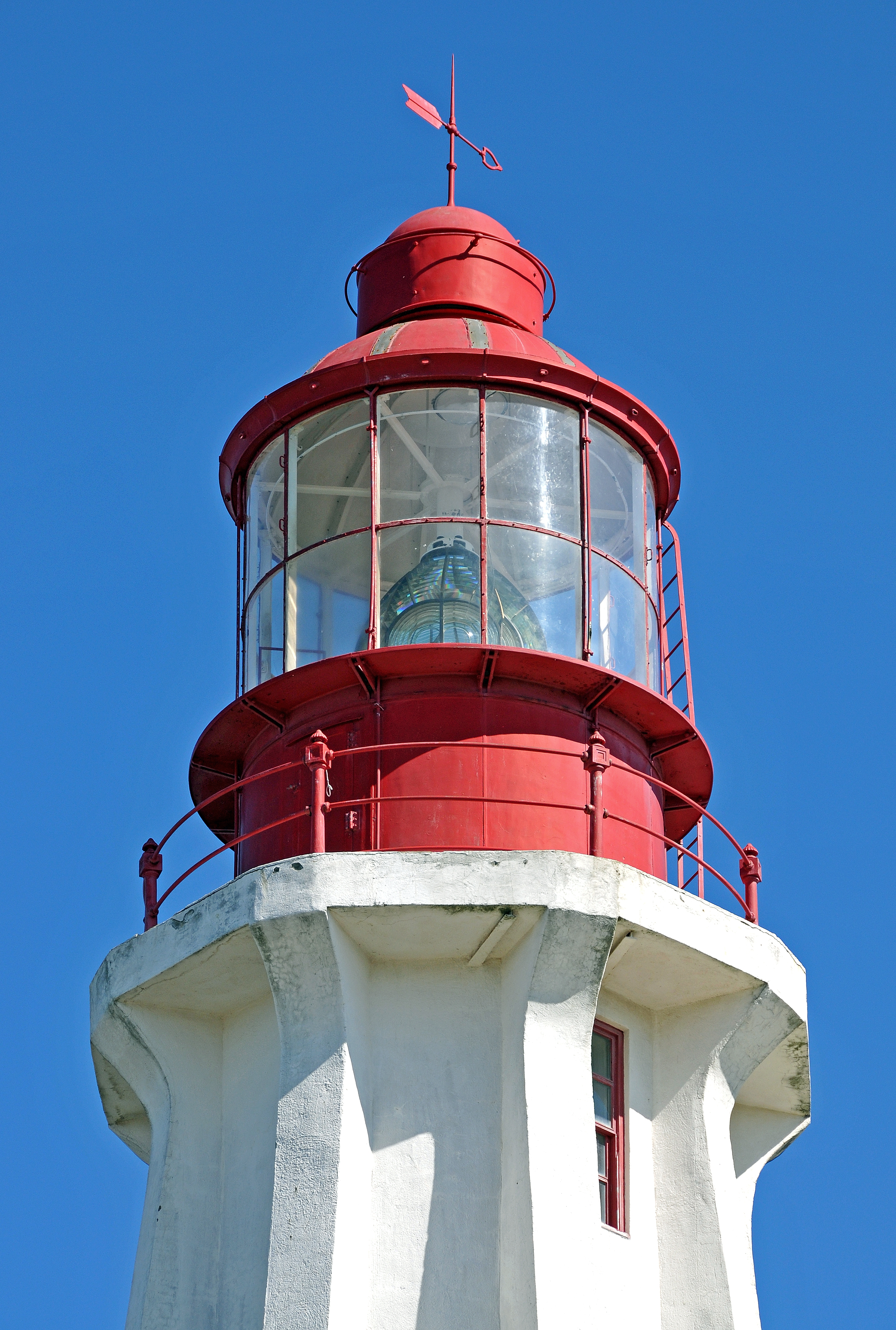 Fanal et coupole du phare de Pointe-au-Père